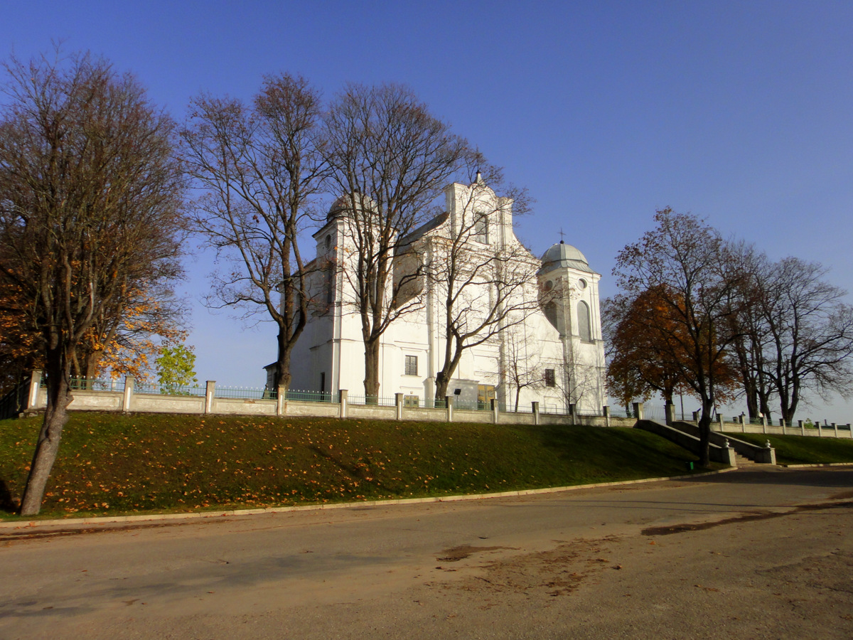 Latgale. Dagda